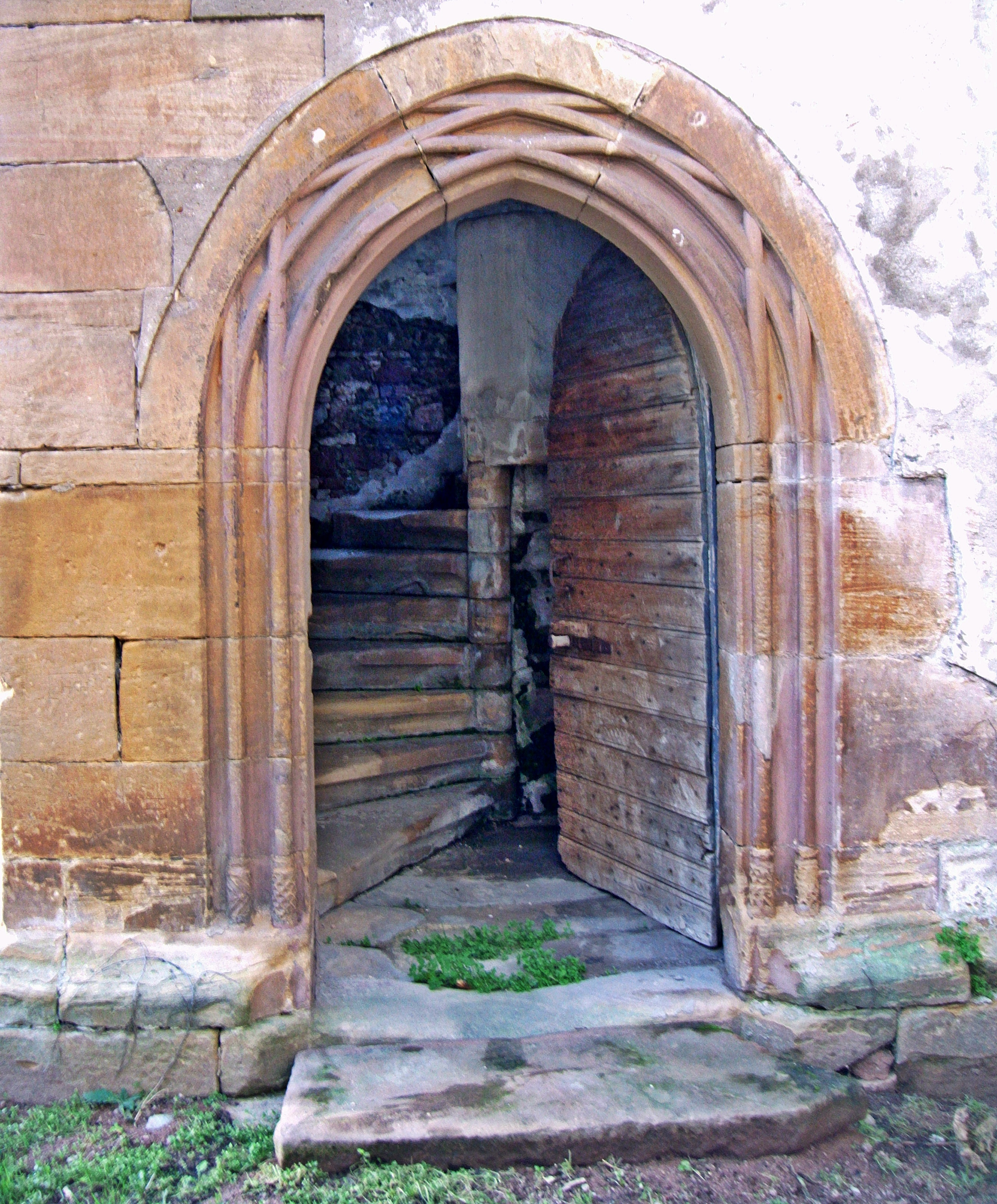 Dirmstein, Bischöfliches Schloss. Spätgotischer Eingang zum Stumpf des Treppenturmes